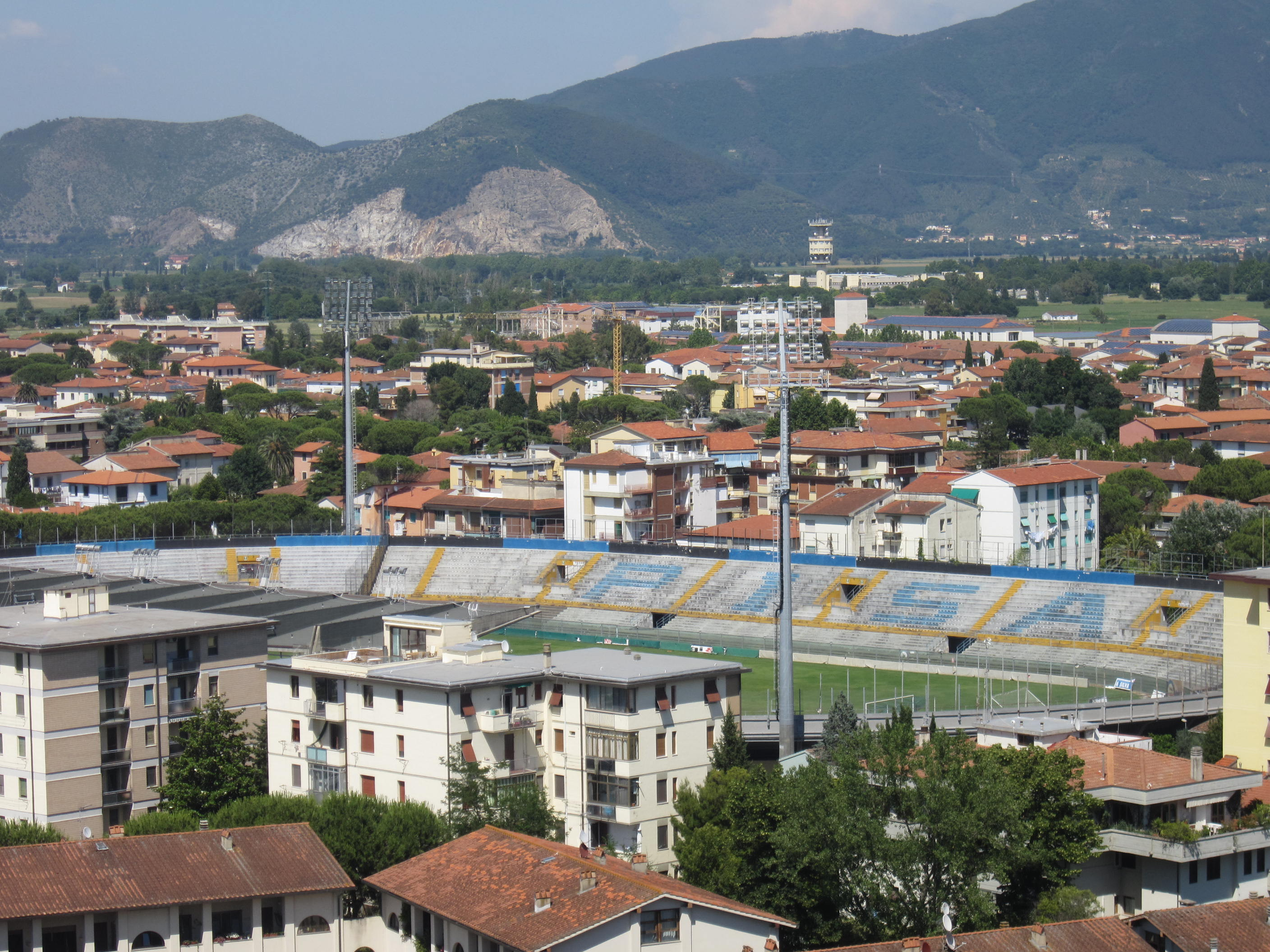 Stadio del Pisa Calcio 1909 dalla Torre Pendente